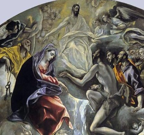 El entierro del señor de Orgaz, más conocido como El entierro del conde de Orgaz, es un óleo sobre lienzo pintado en estilo manierista por El Greco entre los años 1586 y 1588. Fue realizado para la iglesia de Santo Tomé de Toledo, (España), donde aun permanece, y es considerada una de las las mejores obras de su autor. El cuadro representa el milagro en el que, según la tradición, San Esteban y San Agustín de Hipona bajaron del Cielo para enterrar personalmente a Gonzalo Ruiz de Toledo, señor de la villa de Orgaz y fallecido en 1323, en la iglesia de Santo Tomé, como premio por su vida ejemplar de devoción, humildad y obras de caridad. El Greco aceptó el encargo de realizar la obra en 1586, algo más de dos siglos y medio después de los hechos que en ella representó.